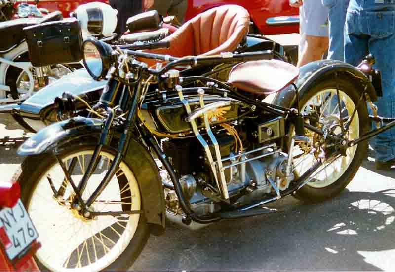 Henderson De Luxe 1300 cc SV 1927